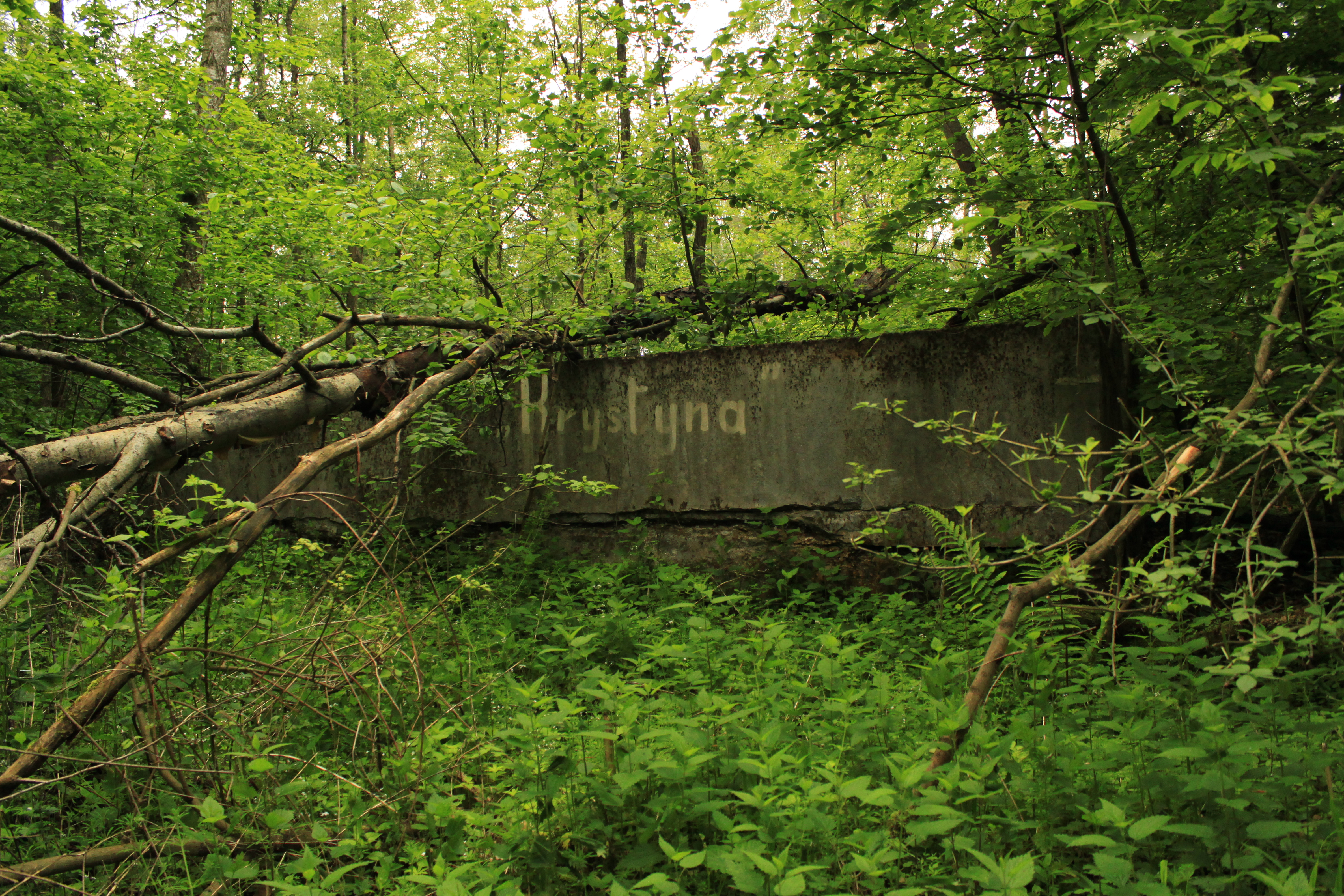 teren nieczynnej Kopalni Węgla Kamiennego "Krystyna II" w Tenczynku